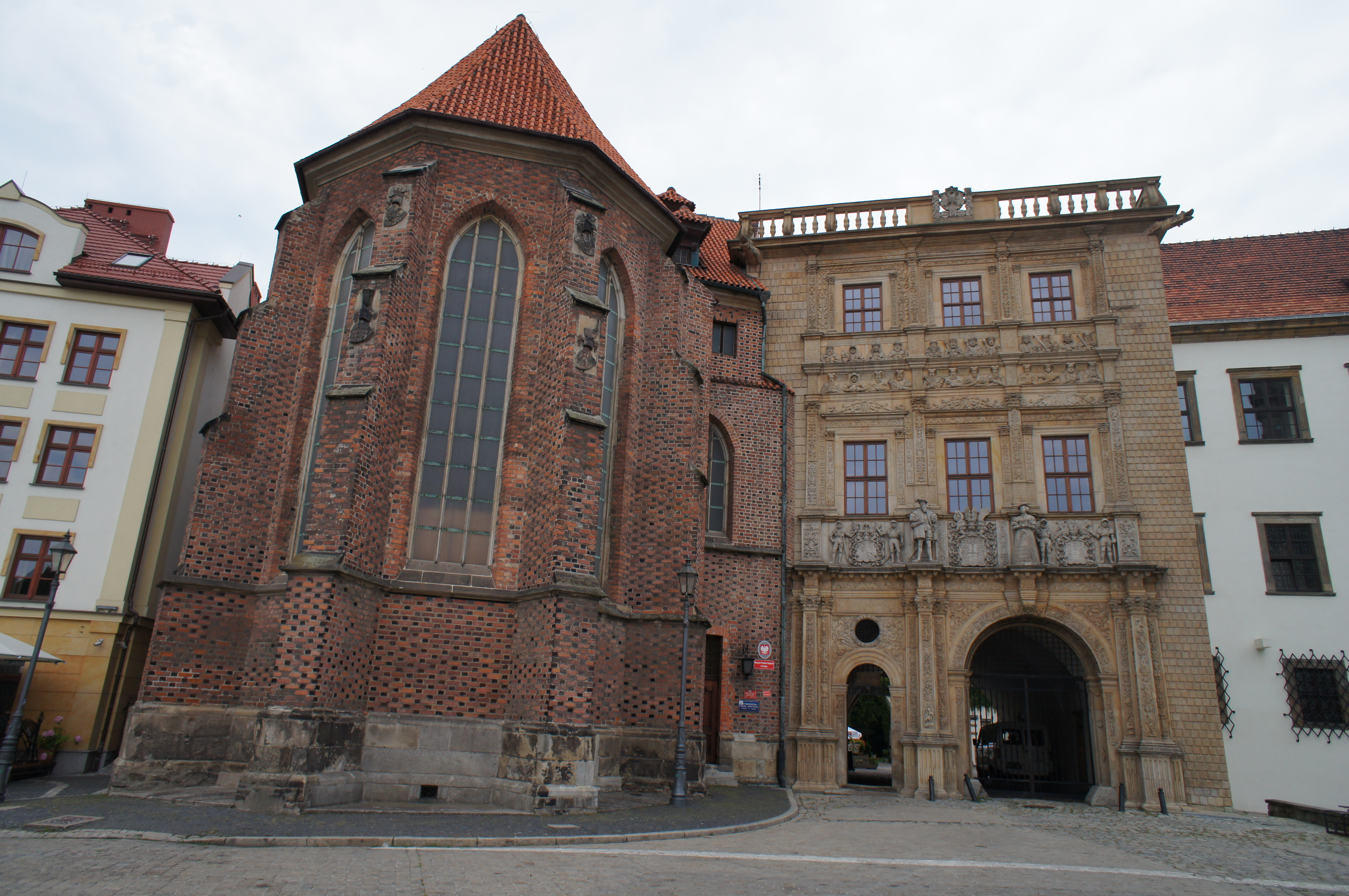 Kościół p.w. św. Jadwigi w zespole zamkowym i brama zamku w Brzegu, woj. opolskie, pow. brzeski 200573 z 26.11.1973; 51458 z 15.11.1958 -Magkrys